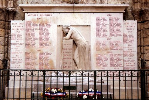 Monument aux morts 14/18 de Crépy-en-Valois